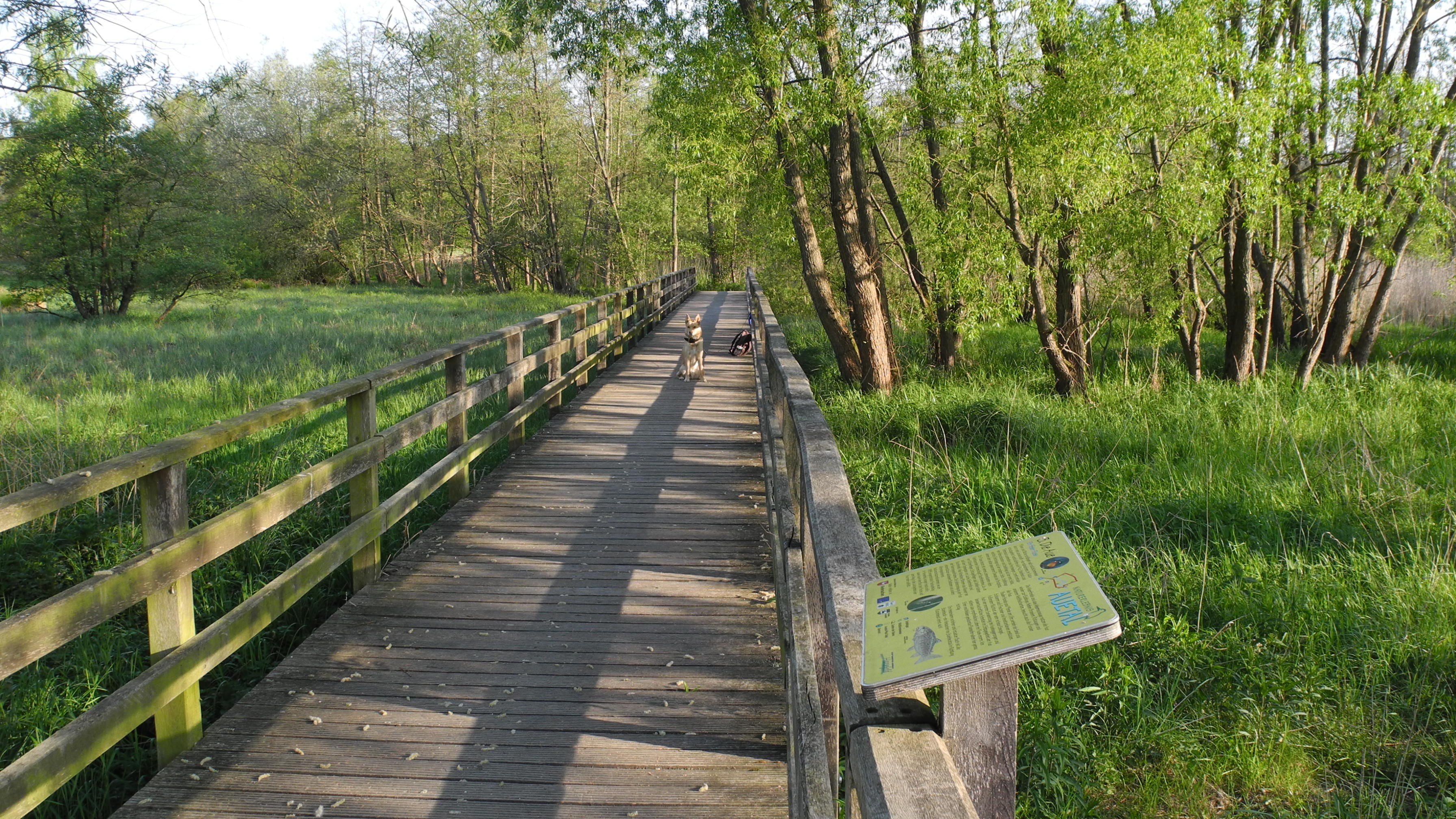 Harsefeld - Steg im Naturschutzgebiet Auetal